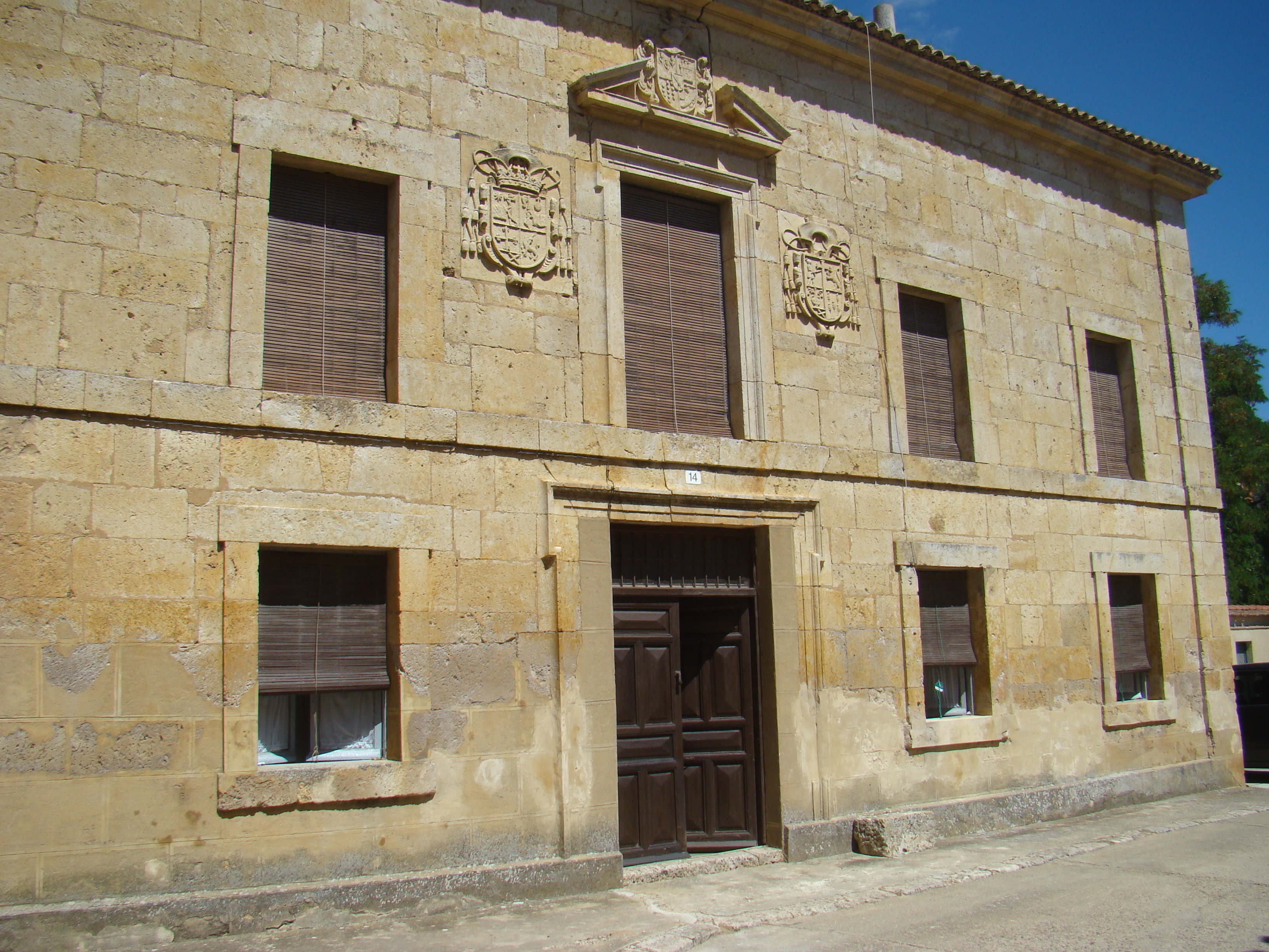 Támara de Campos (Palencia, España). Edificio del Priorato del monasterio benedictino de San Miguel.